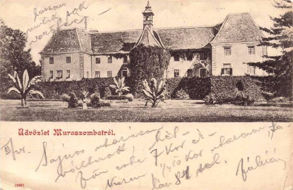 Szaparyjev grad v Murski Soboti - pogled iz zahoda na vrt z eksotičnimi rastlinami.